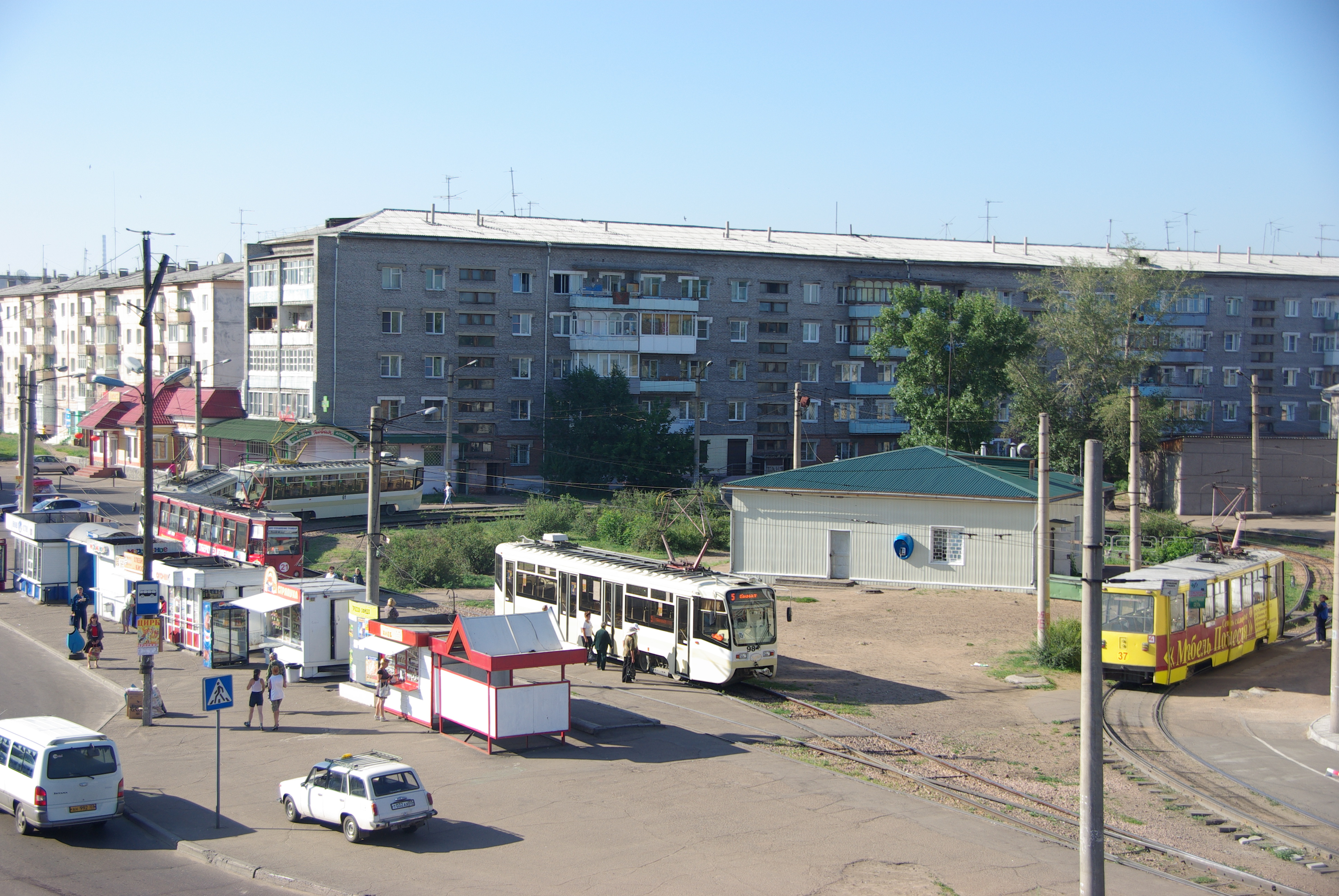 Трамвай Улан-Удэ